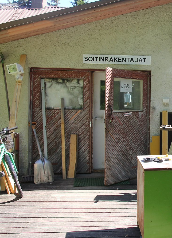 Soitinrakentajat AmF on Pohjois-Savon Leppävirroilla toimiva suomalainen soitinrakentajayritys. Tämä usean soitinrakentajan yhteisö on tunnettu muun muassa suomalaisten 5–40 -kielisten kanteleiden valmistajana. Vierailuhetkellä soitinverstaan tiloja oltiin kunnostamassa.